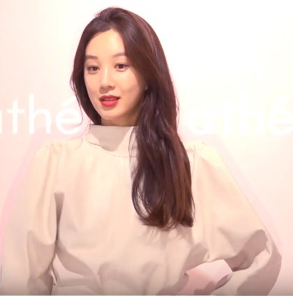 1일 오후 서울 용산구 스페이스K에서 '아떼(ATHE)' 론칭 포토 행사가 열렸다.